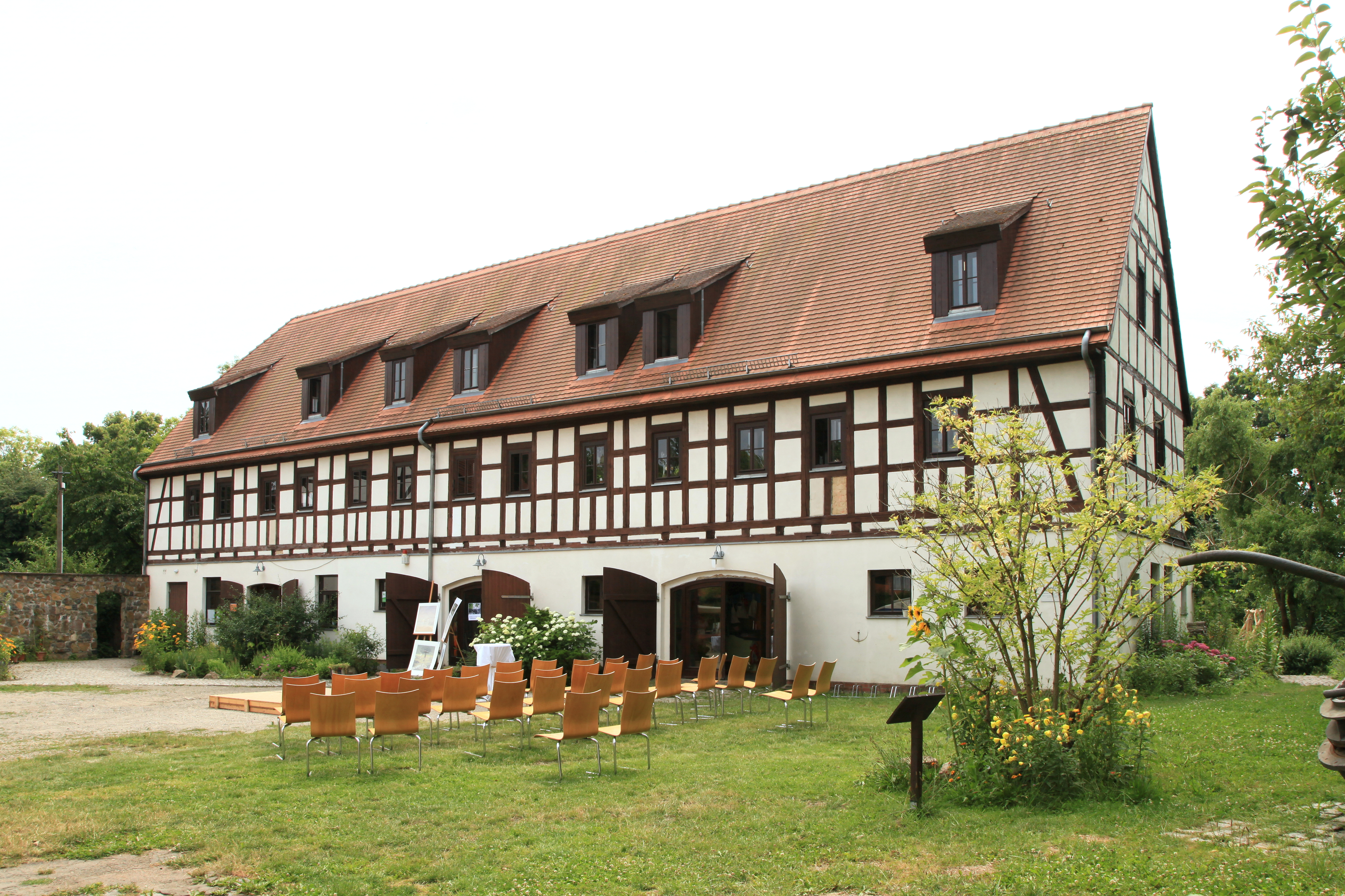 Auf dem Gelände der Wassermühle Dölitz neu aufgebautes Fachwerkhaus aus Breunsdorf, Vollhardtstraße 16 in Leipzig